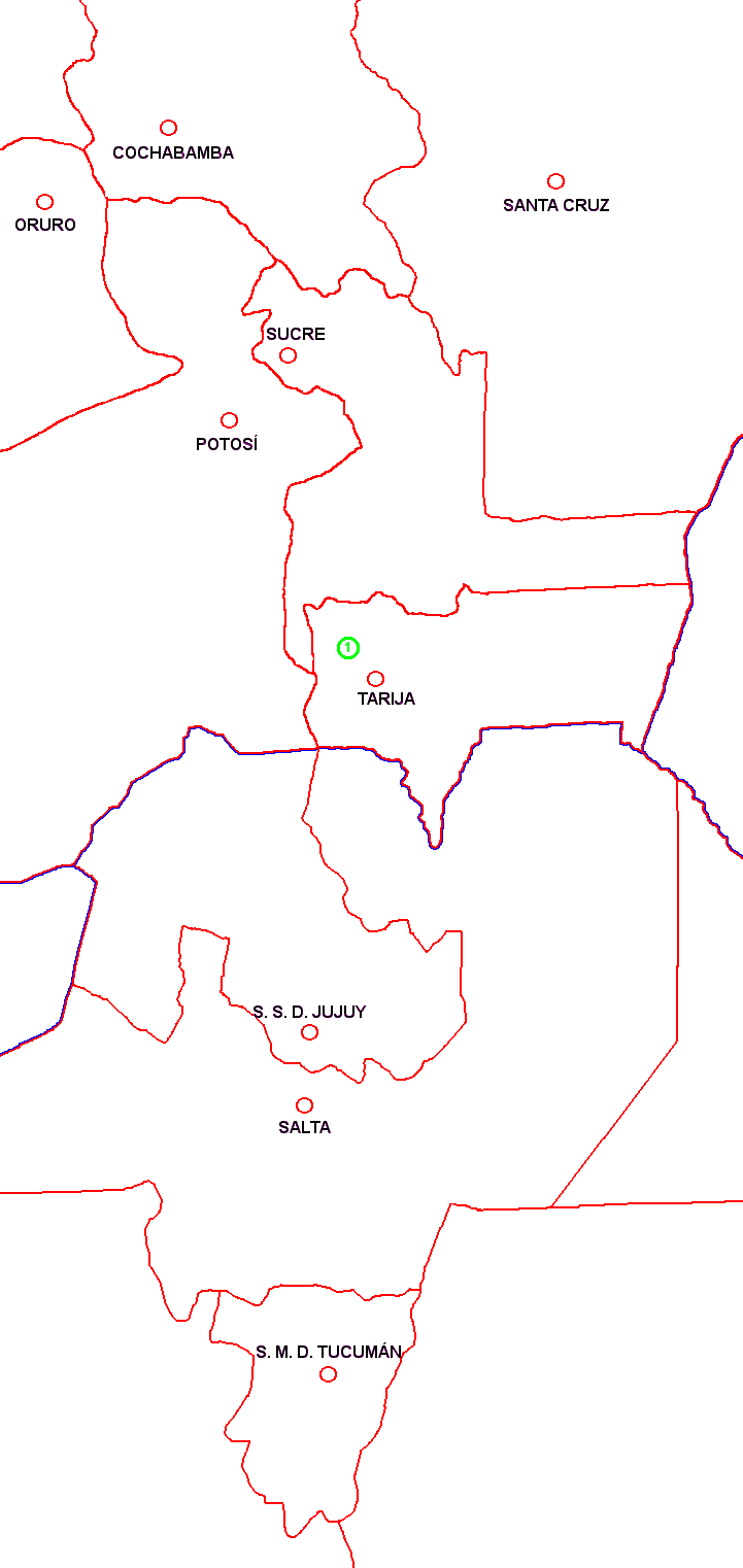 Rebutia brunneoradicata - range map